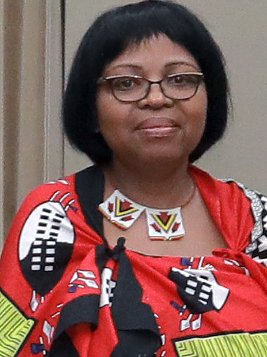 史瓦濟蘭王國內政部長桑蒂蕾郡主（Princess Tsandzile）偕夫婿姆祿利（Musa Felix Mdluli）及該部政務次長馬錫烈拉（Anthony Masilela）一行3人應中華民國政府邀請訪臺